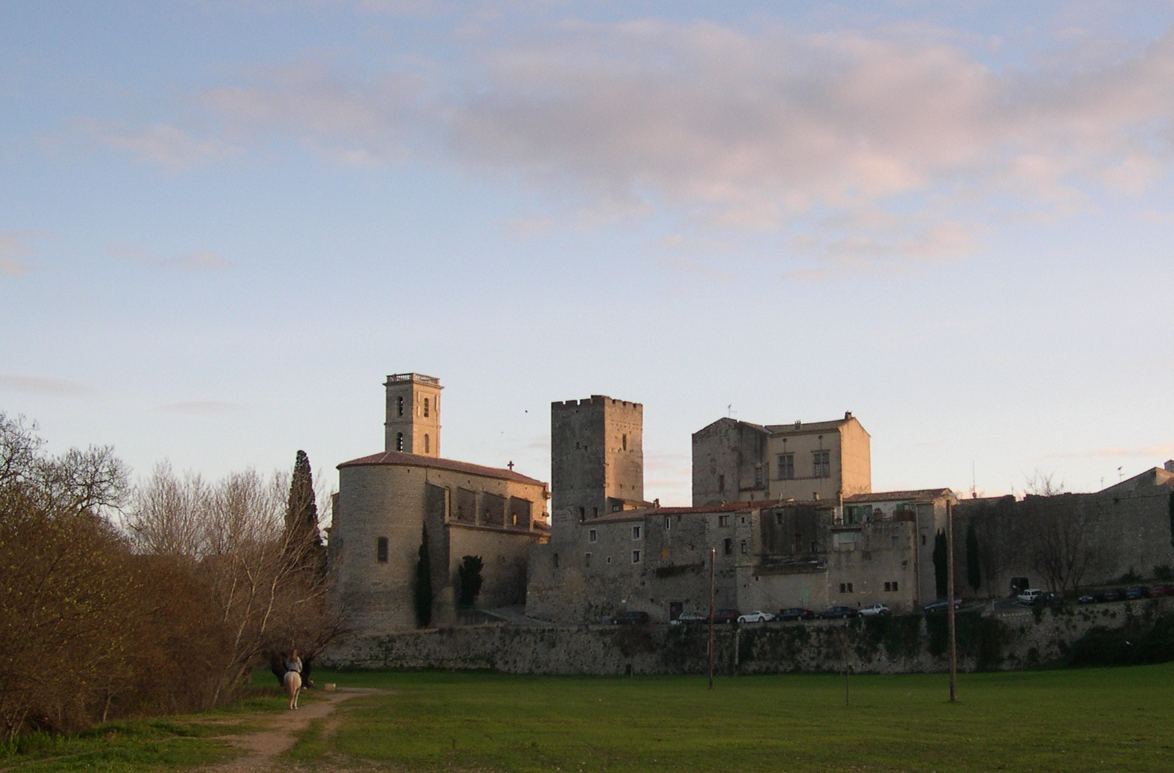 Cournonterral (Hérault), l'église Sainte-Croix, la tour et les remparts